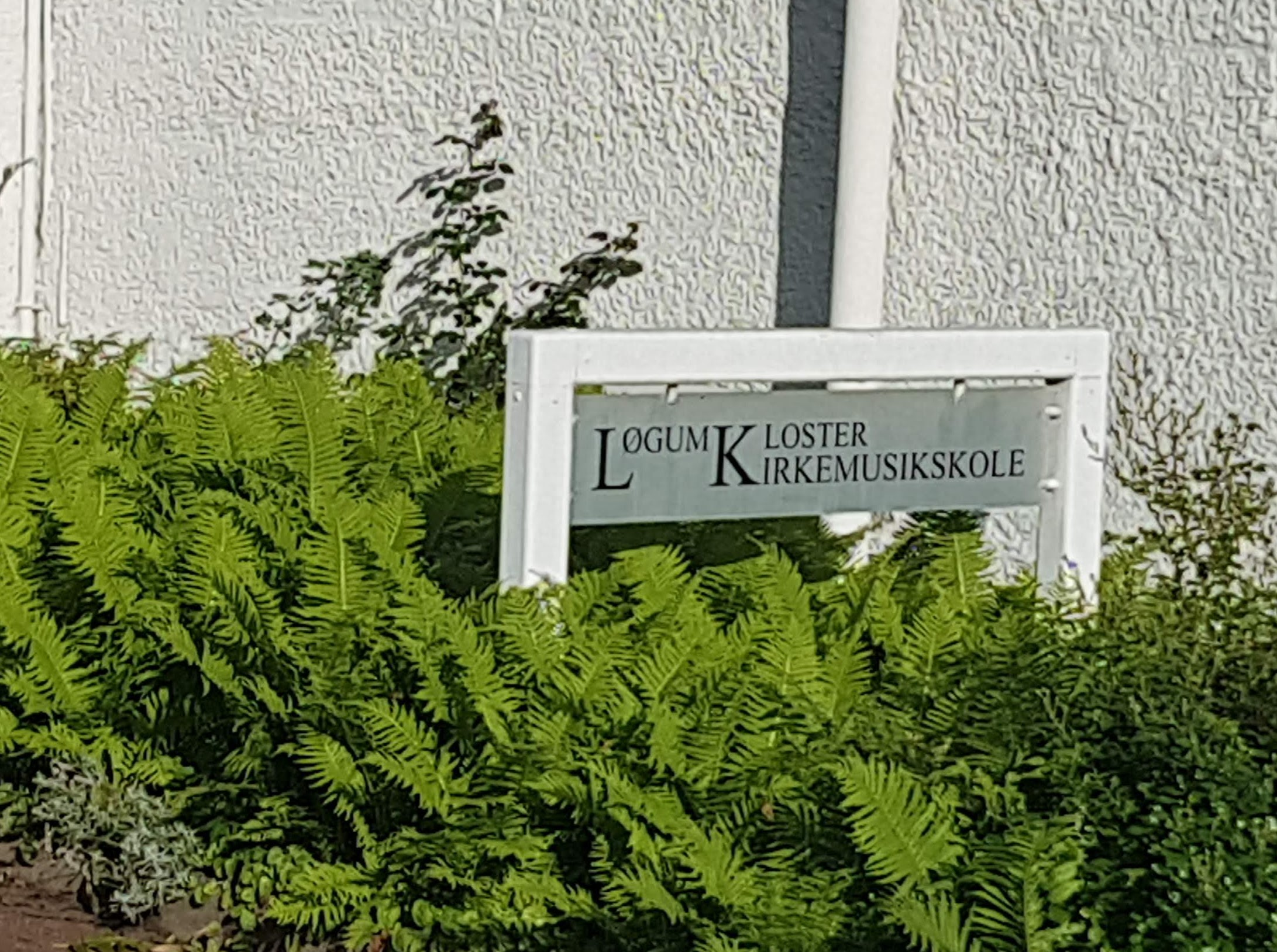 Scandinavian Carillon School